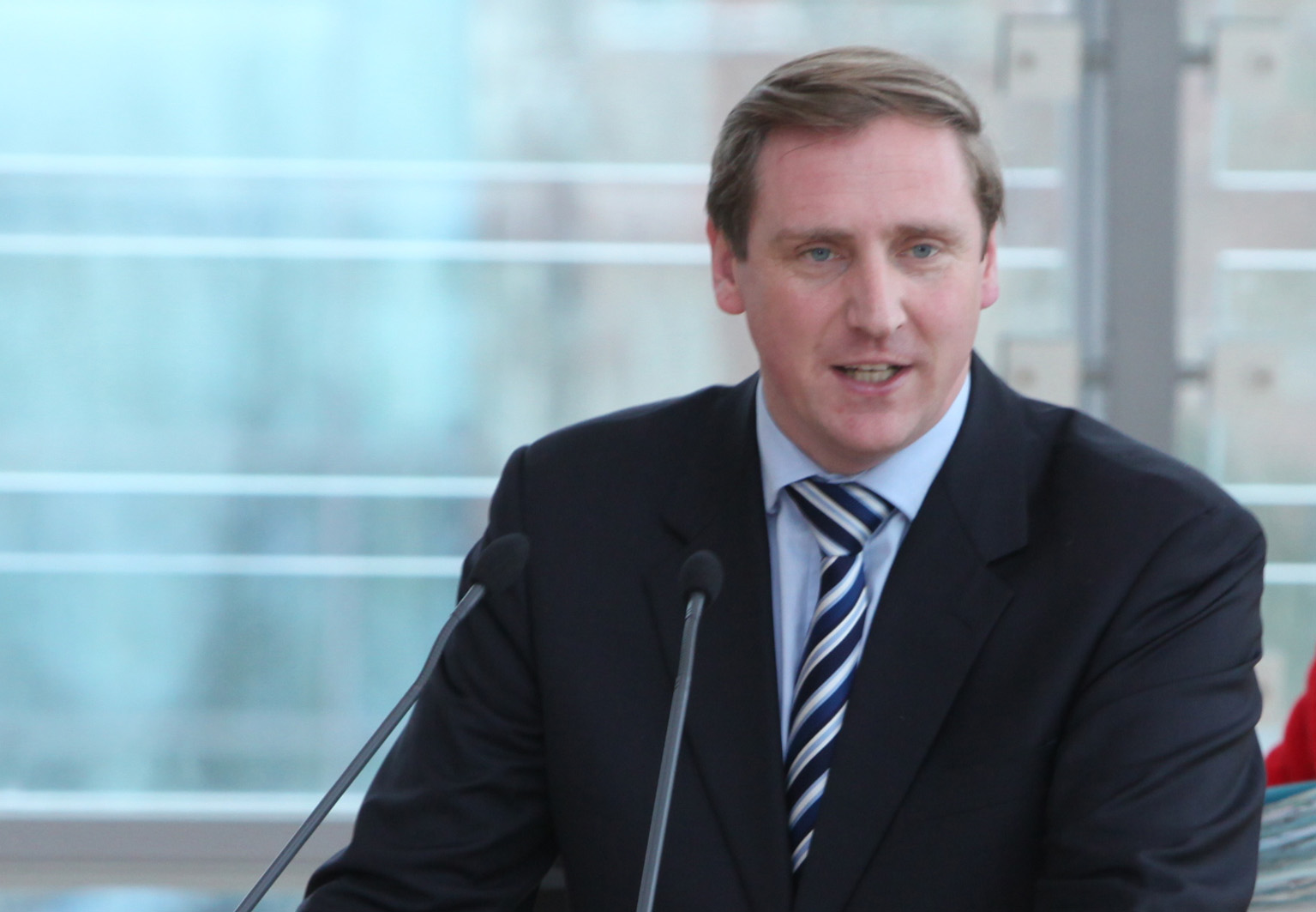 Christian von Boetticher bei einer Rede im schleswig-holsteinischen Landtag